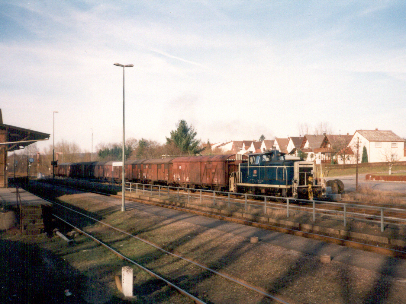 Eine Diesellok der Baureihe 360 durchfährt von Ottbergen kommend den Bahnhof Lauenförde-Beverungen auf dem Weg nach Göttingen.